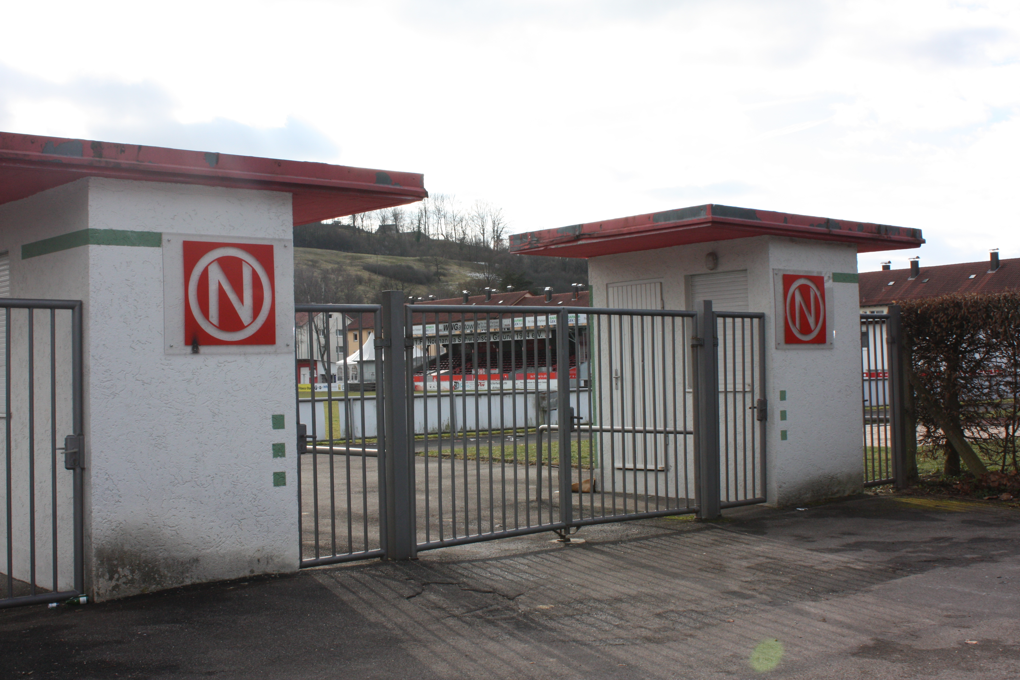 Haupteingang und Kassenhäuschen im Jahn-Stadion (Normannia-Stadion) Schwäbisch Gmünd, Heimspielstätte des 1. FC Normannia Gmünd